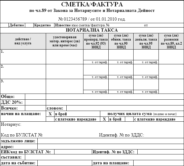 сметка-фактура по закона за нотариусите и нотариалната дейност